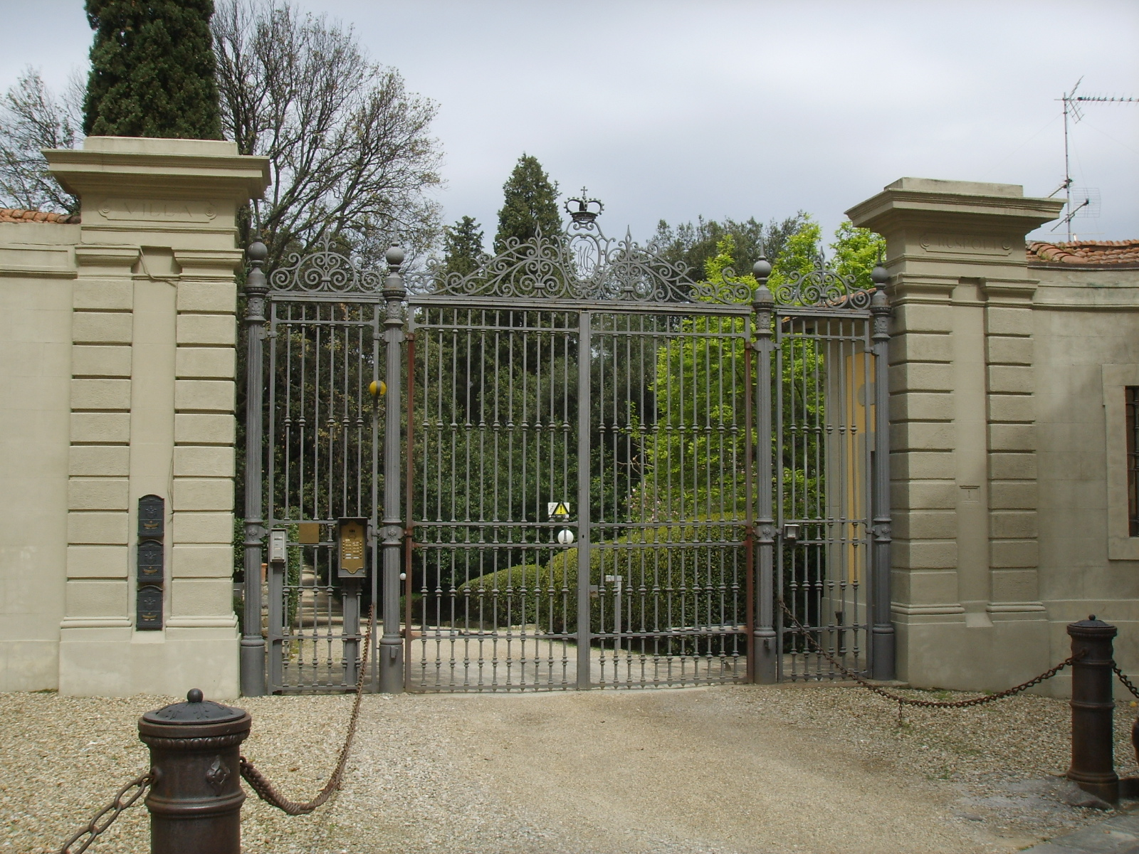 Villa ruspoli ingresso